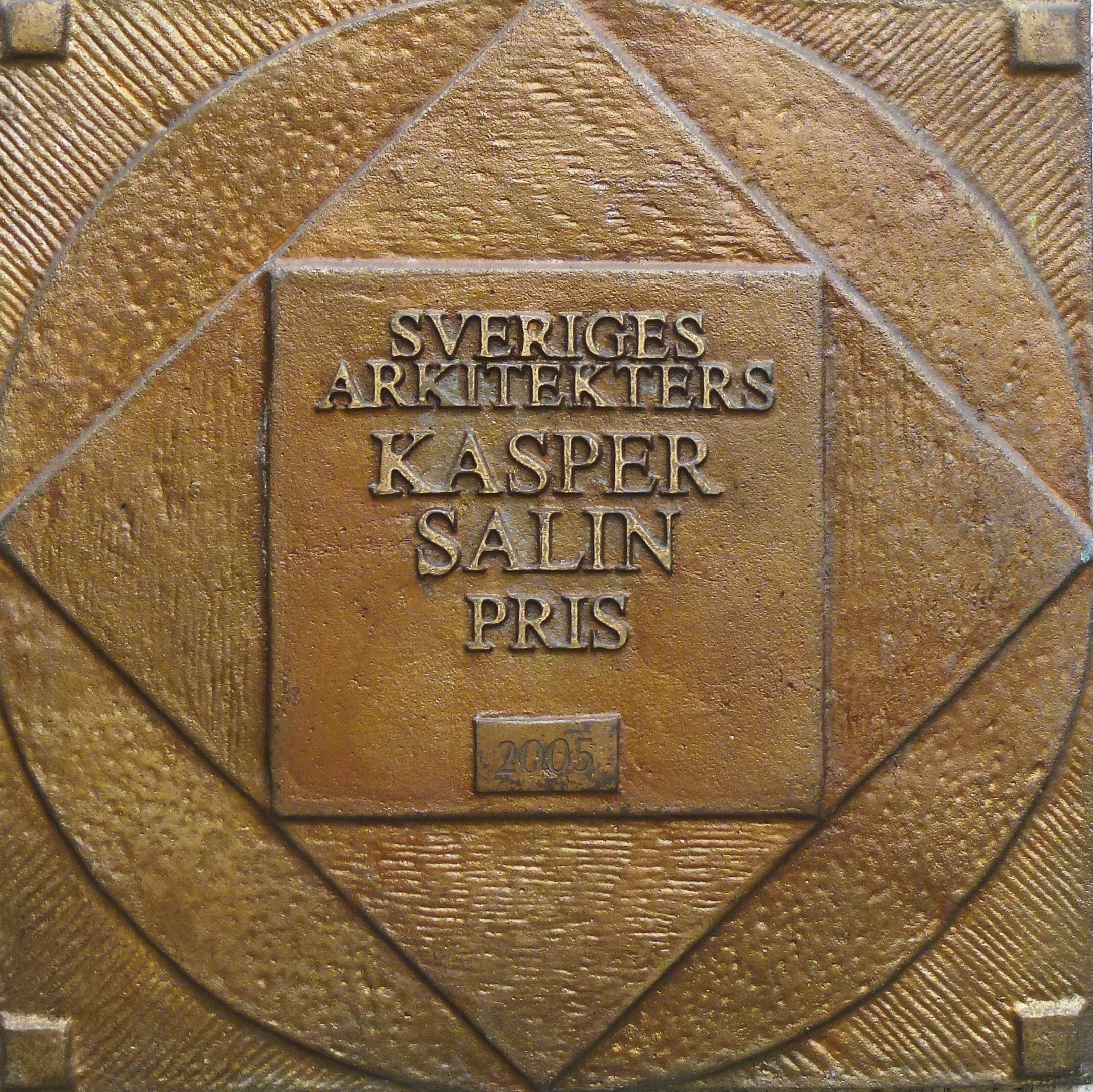 Kasper Salin-priset för Sjöstadsparterren, Hammarby sjöstad